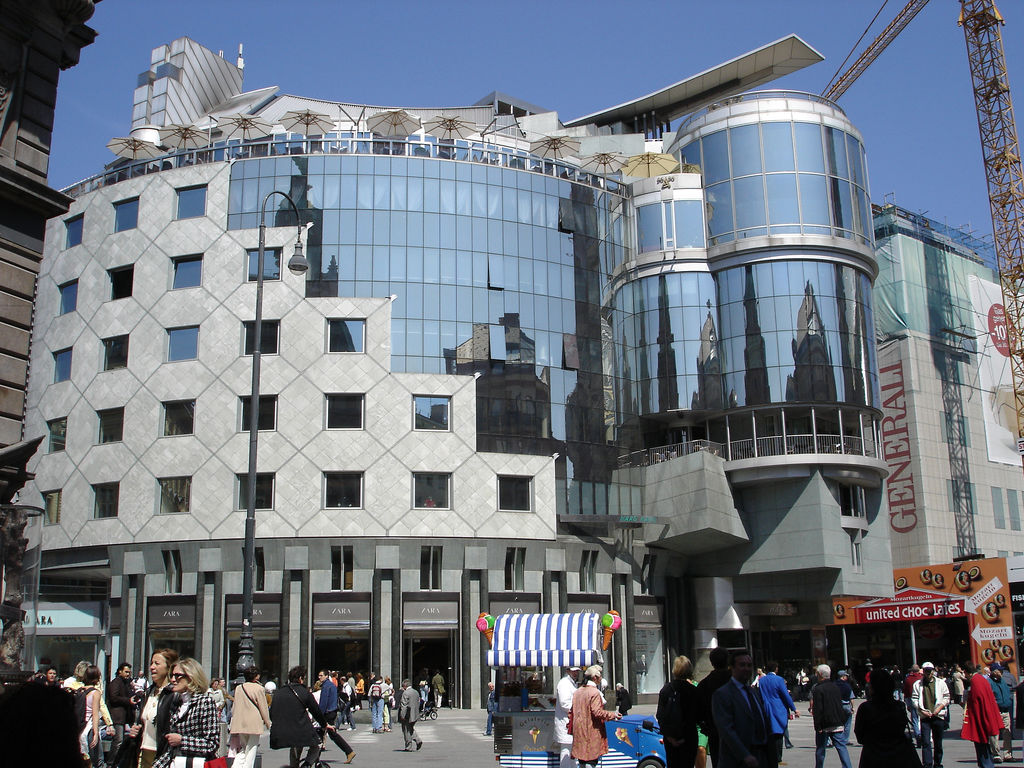 Haas-Haus, Vienna, Austria